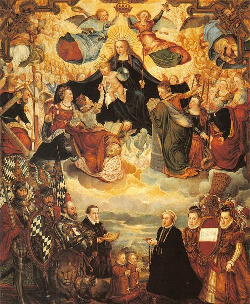 Herzog Albrecht V. von Bayern mit seiner Familie, von Hans Mielich, 1572